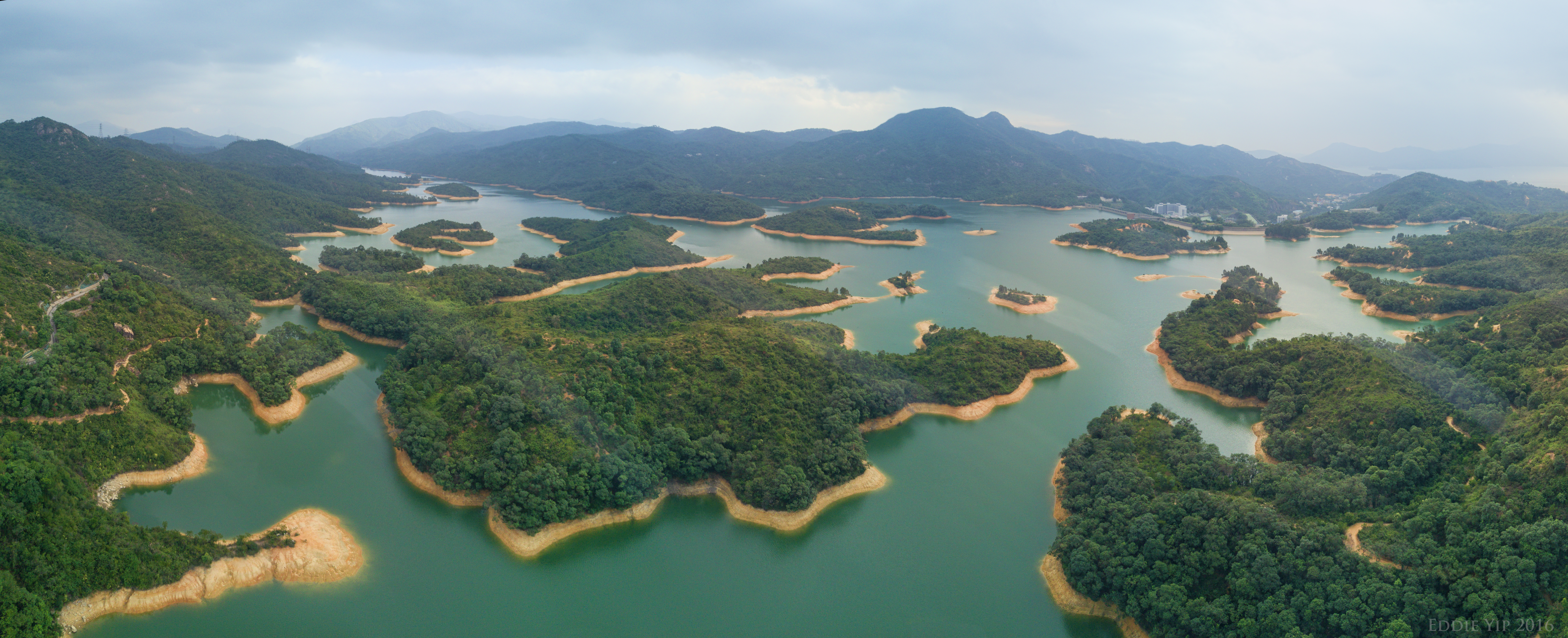 Tai Lam Chung Reservoir 大欖涌水塘